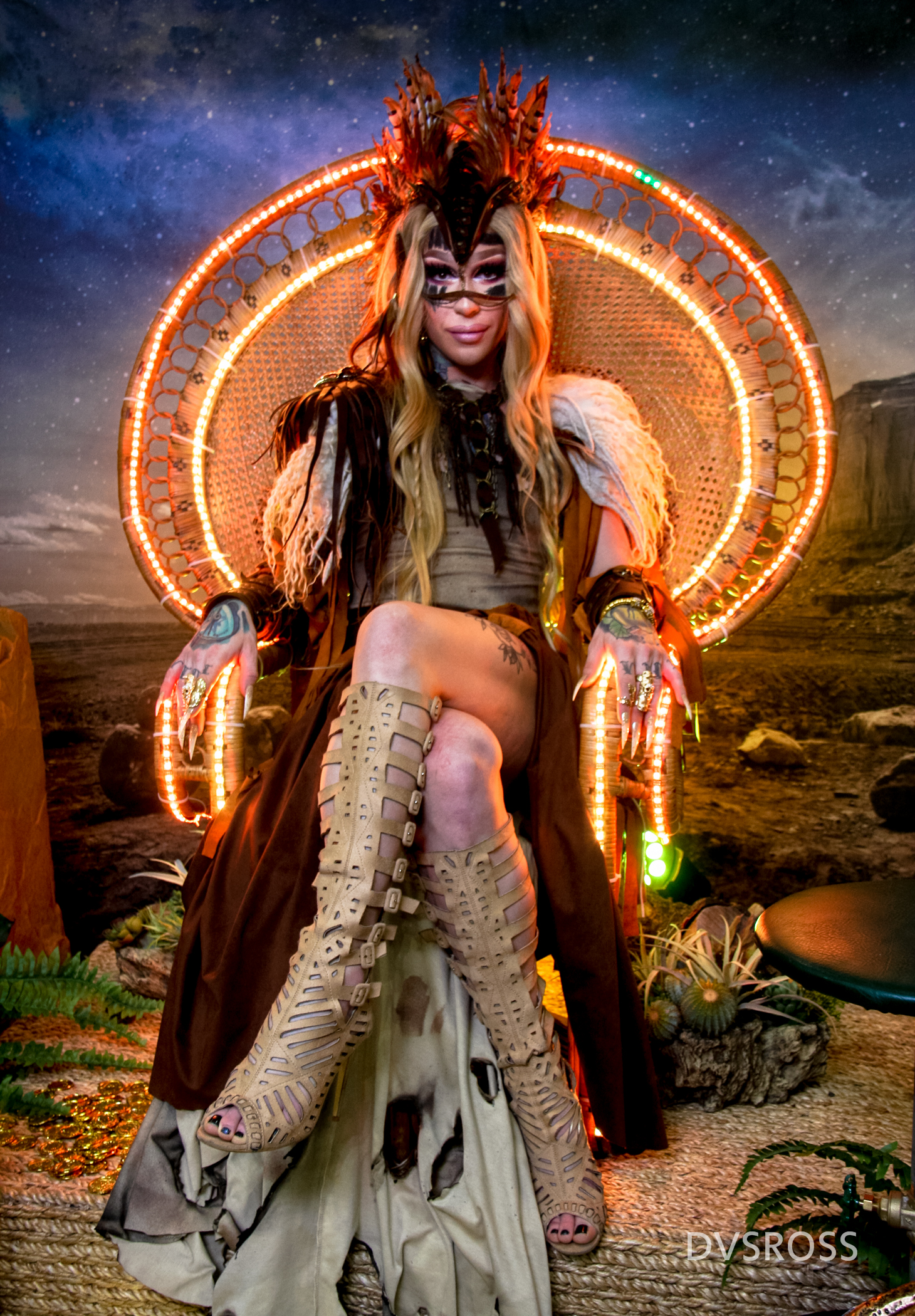 Rupaul DragCon 2019 - Los Angeles